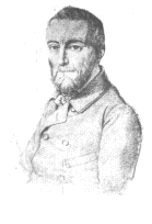 Адольф Эрман (1806-1877)